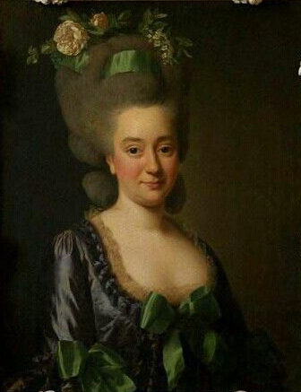 Portraet af Louise Chaussé épouse Foache